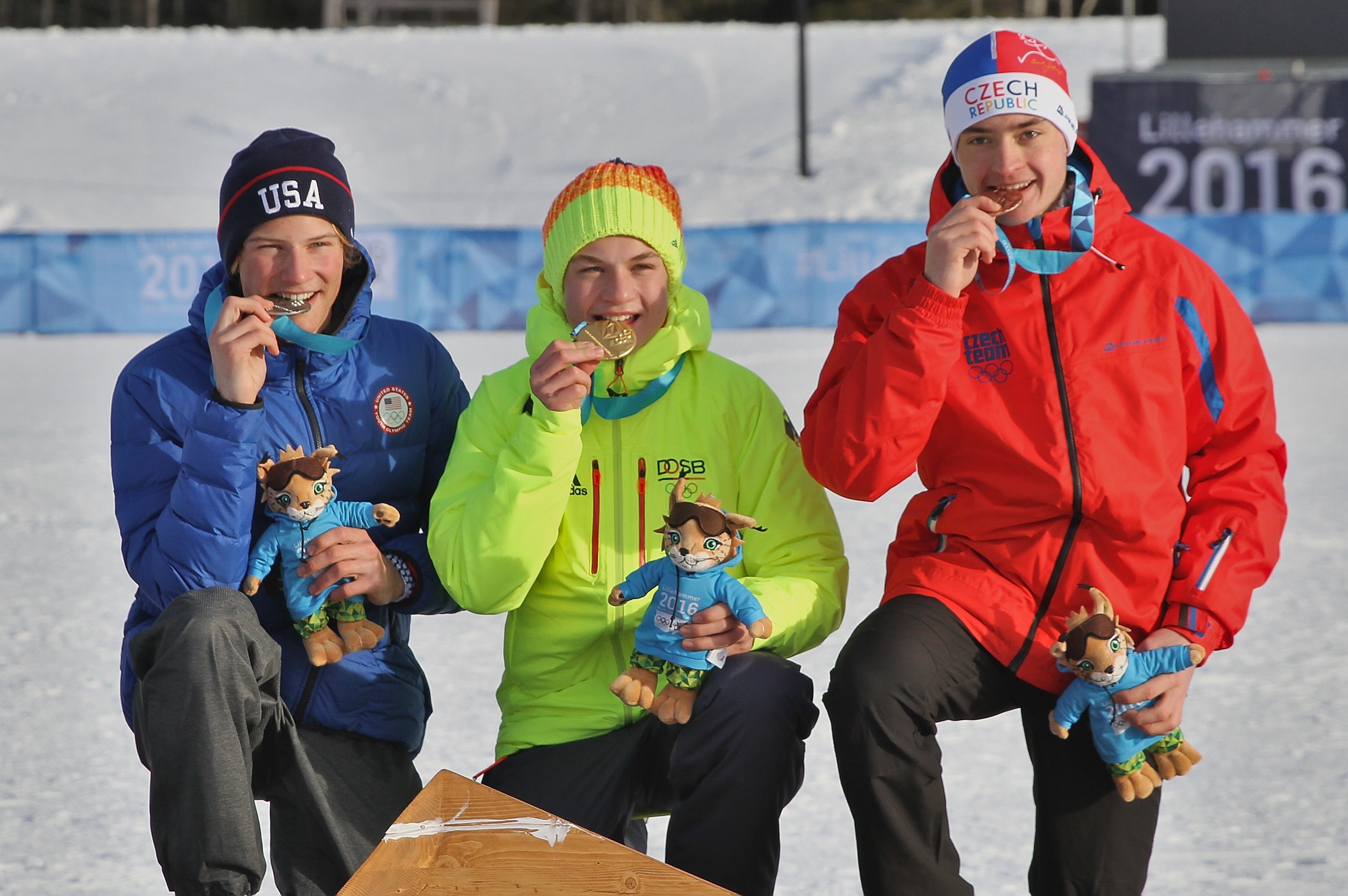 Lillehammer 2016 Médailles combiné nordique - Tim Kopp (GER), Ben Loomis (USA) and Ondřej Pažout (CZE)